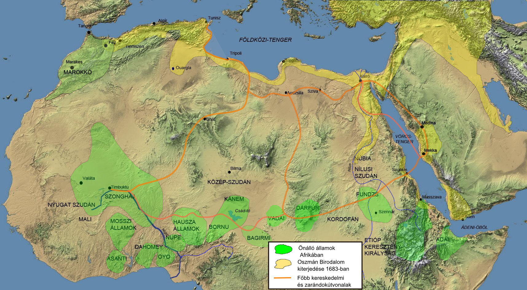 Afrika, és az iszlám a 16-17. században